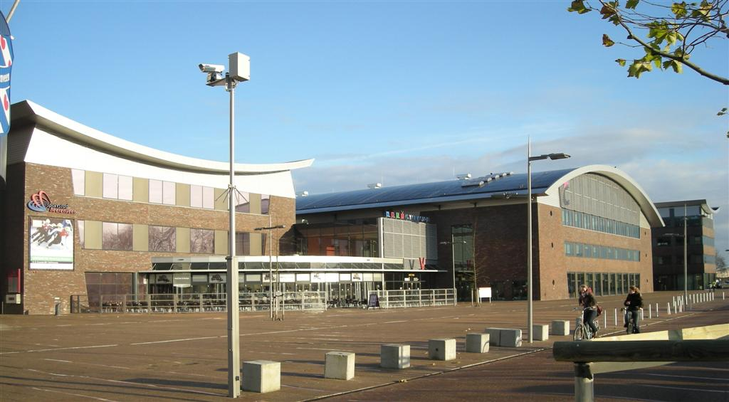 Sportstad Heerenveen, oostzijde